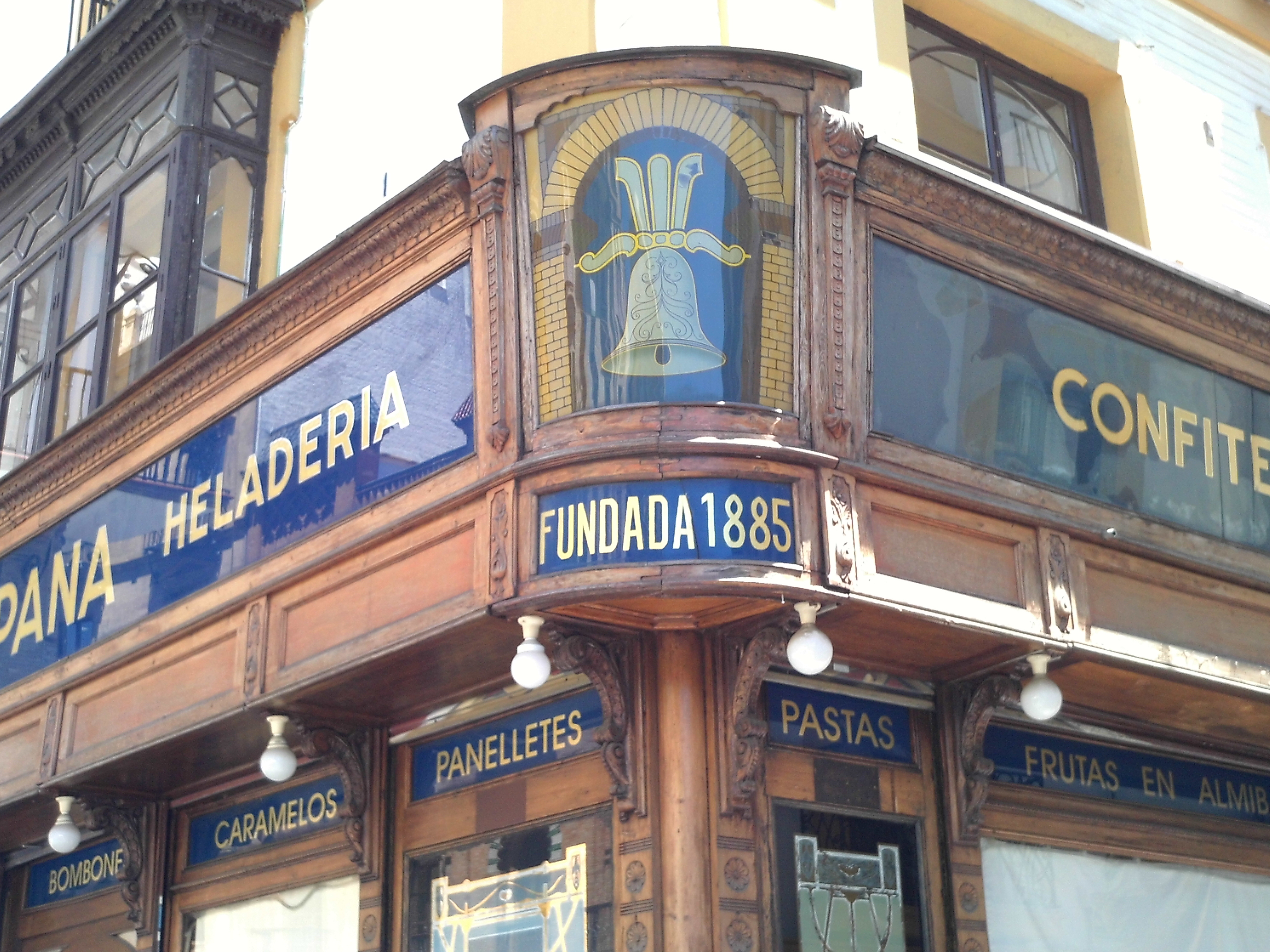 Confitería La Campana. Sevilla, Andalucía, España.